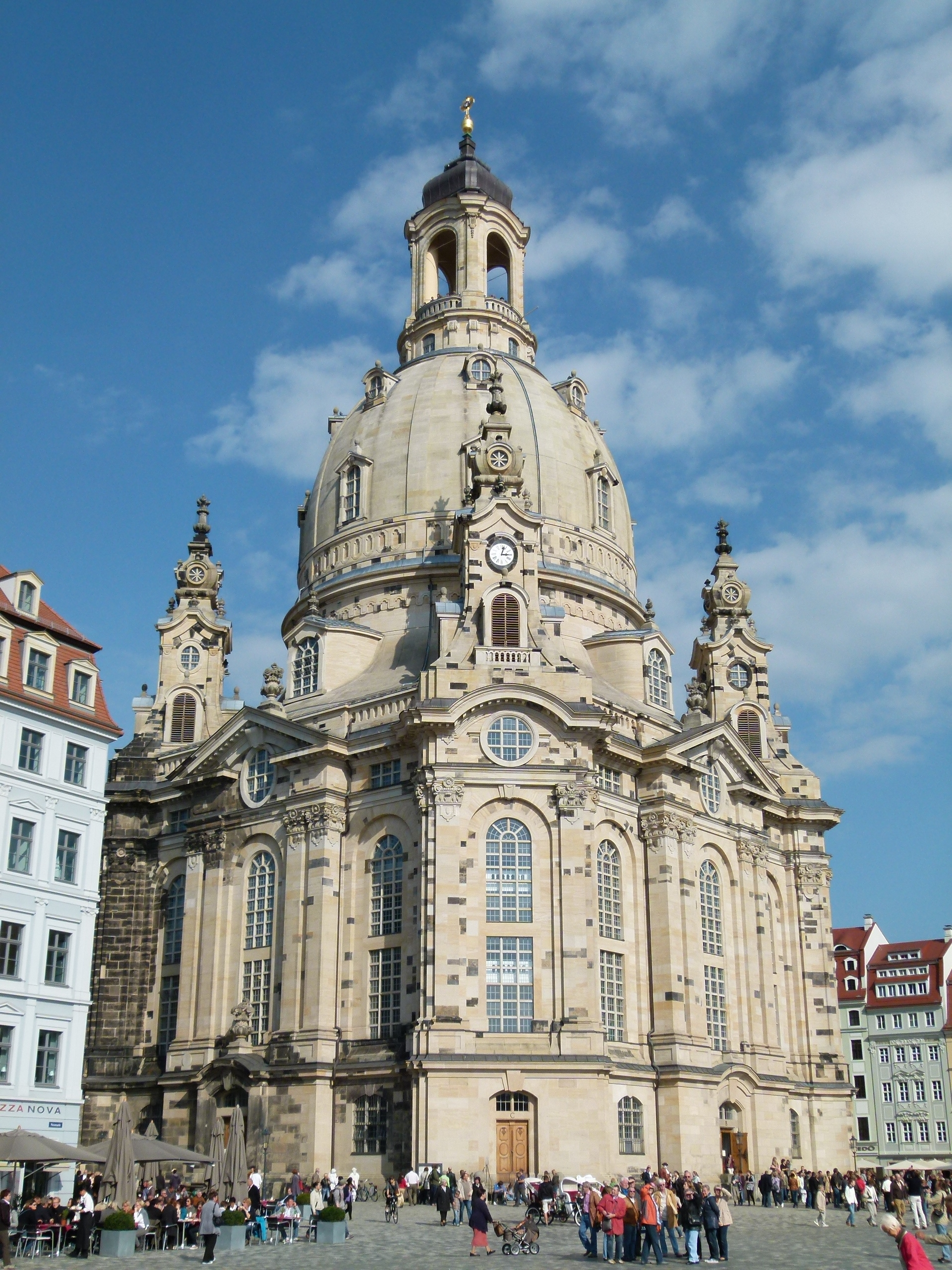 Die Frauenkirche in Dresden